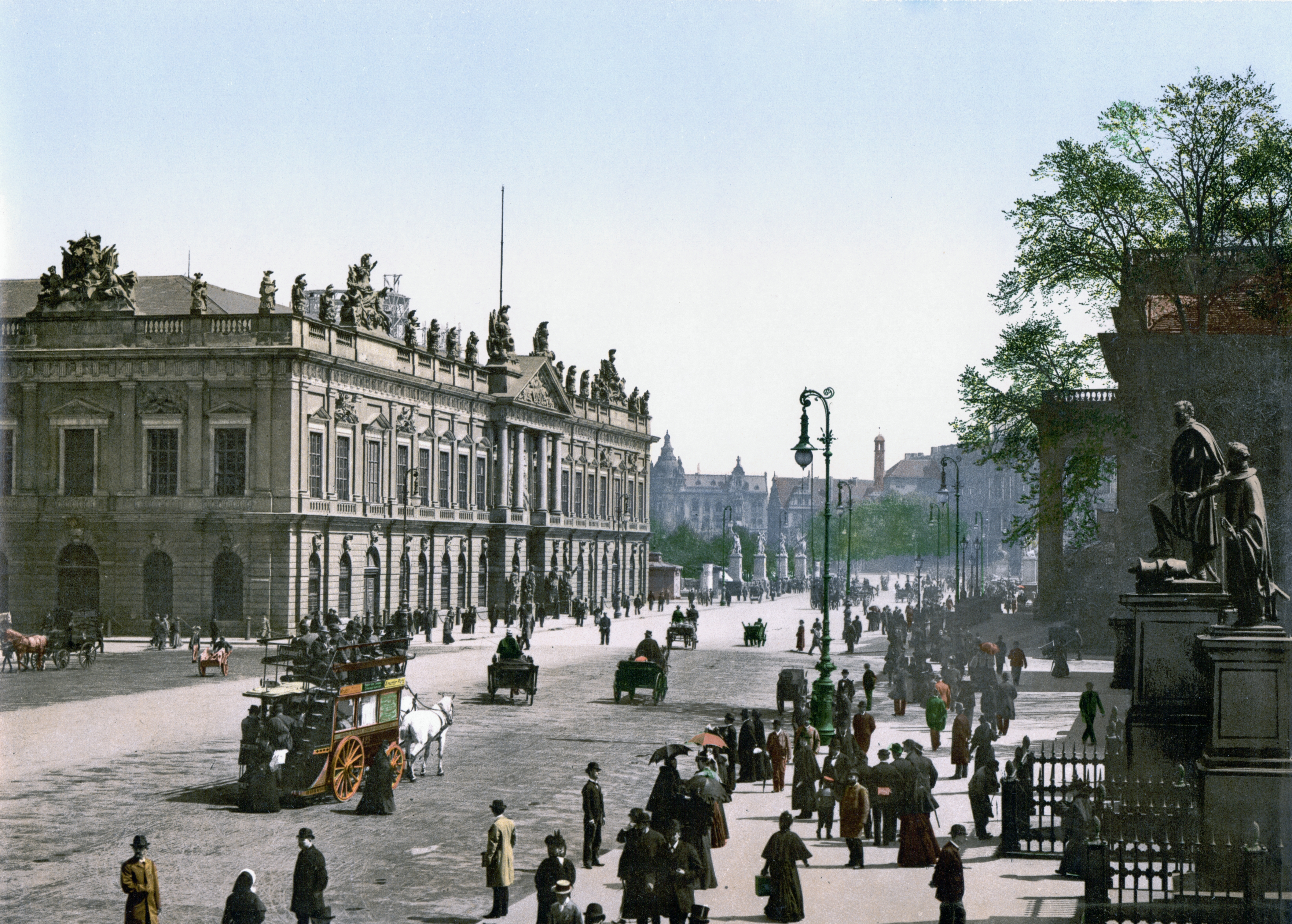 Berlin Zeughaus zwischen 1890 und 1900